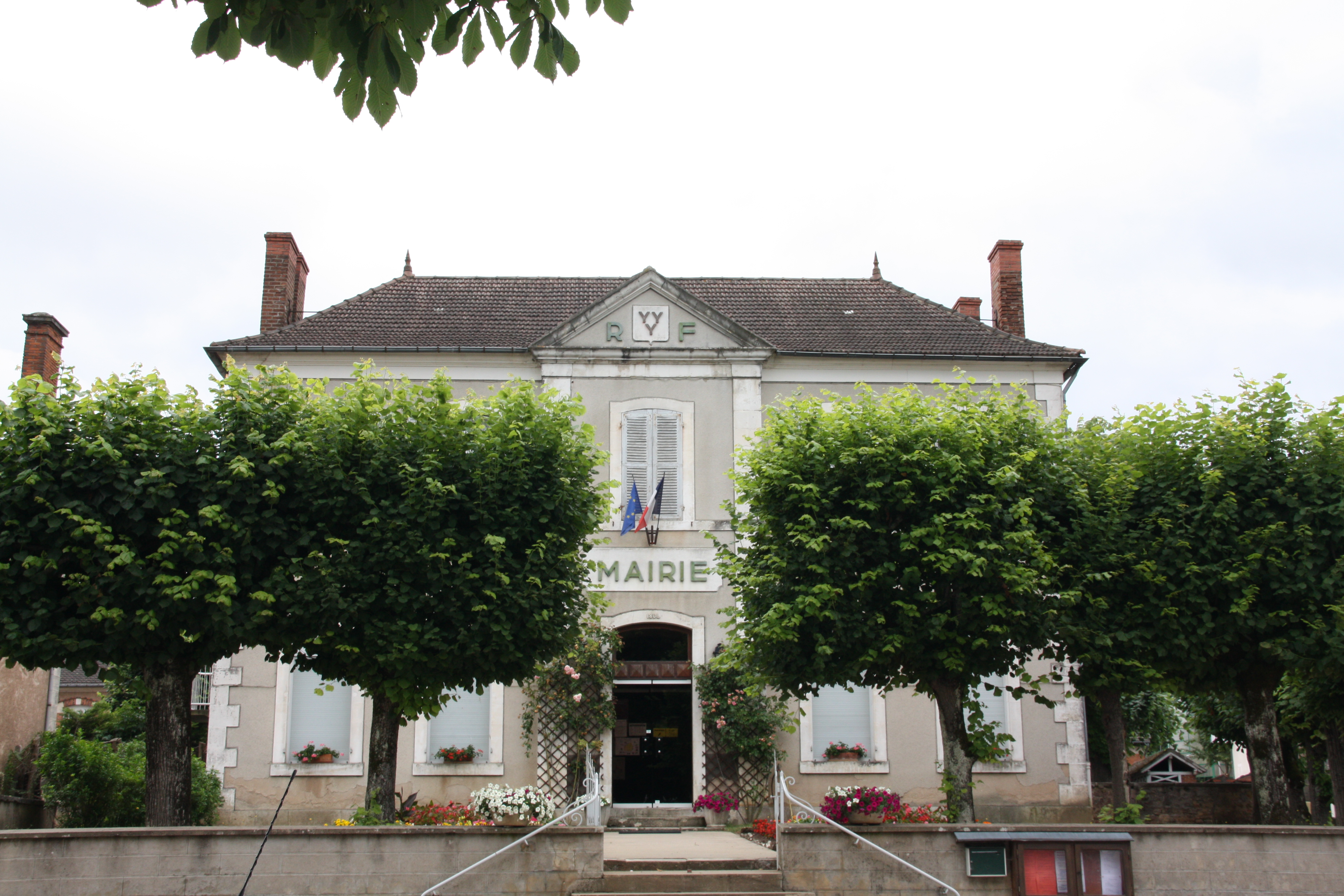 Mairie d'Ainay-le-Château, France.